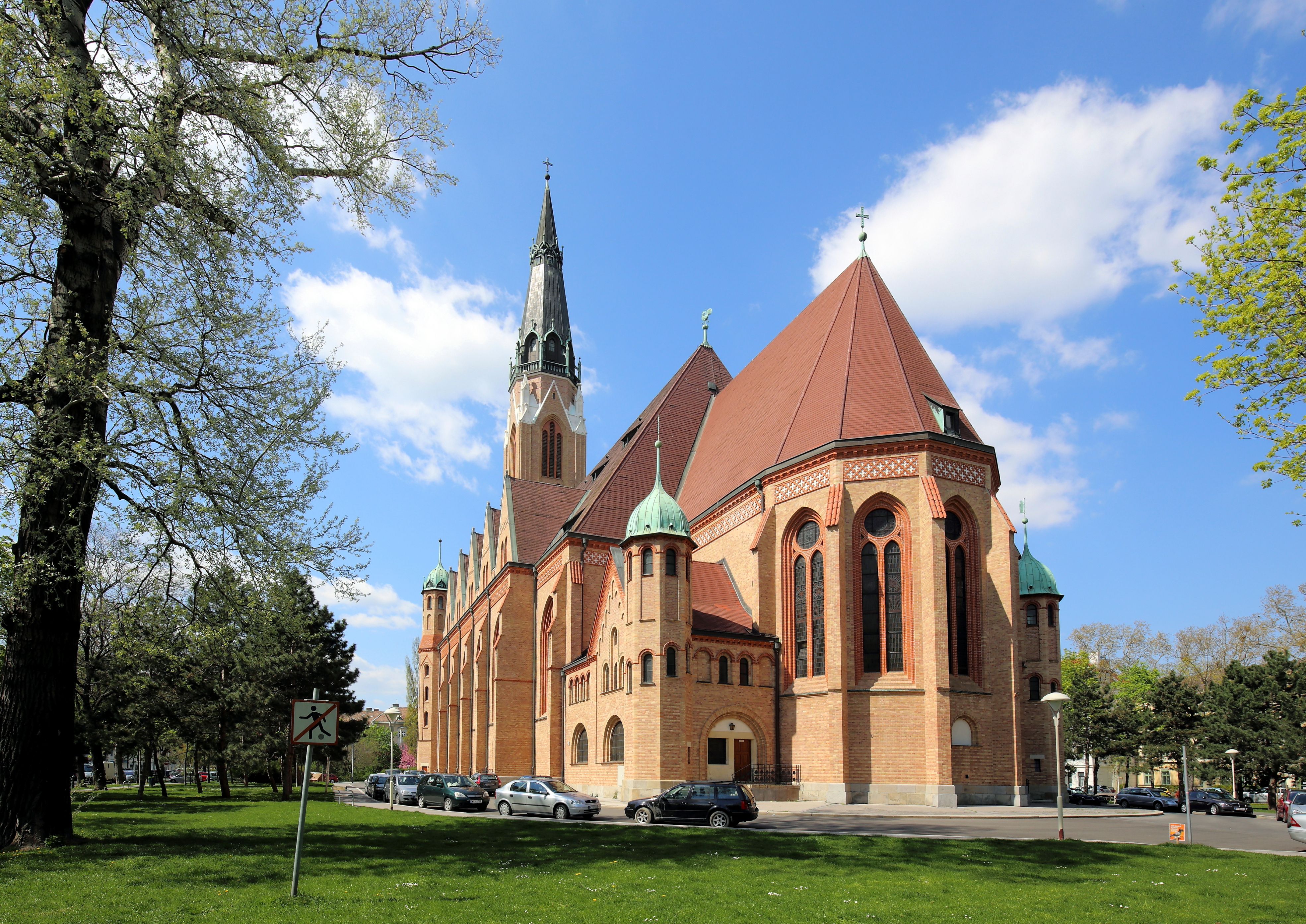 Südostansicht Donaufelder Pfarrkirche im 21. Wiener Gemeindebezirk Floridsdorf. Die neugotische Hallenkirche aus Backstein entstand 1905–14 nach Plänen von Franz von Neumann.